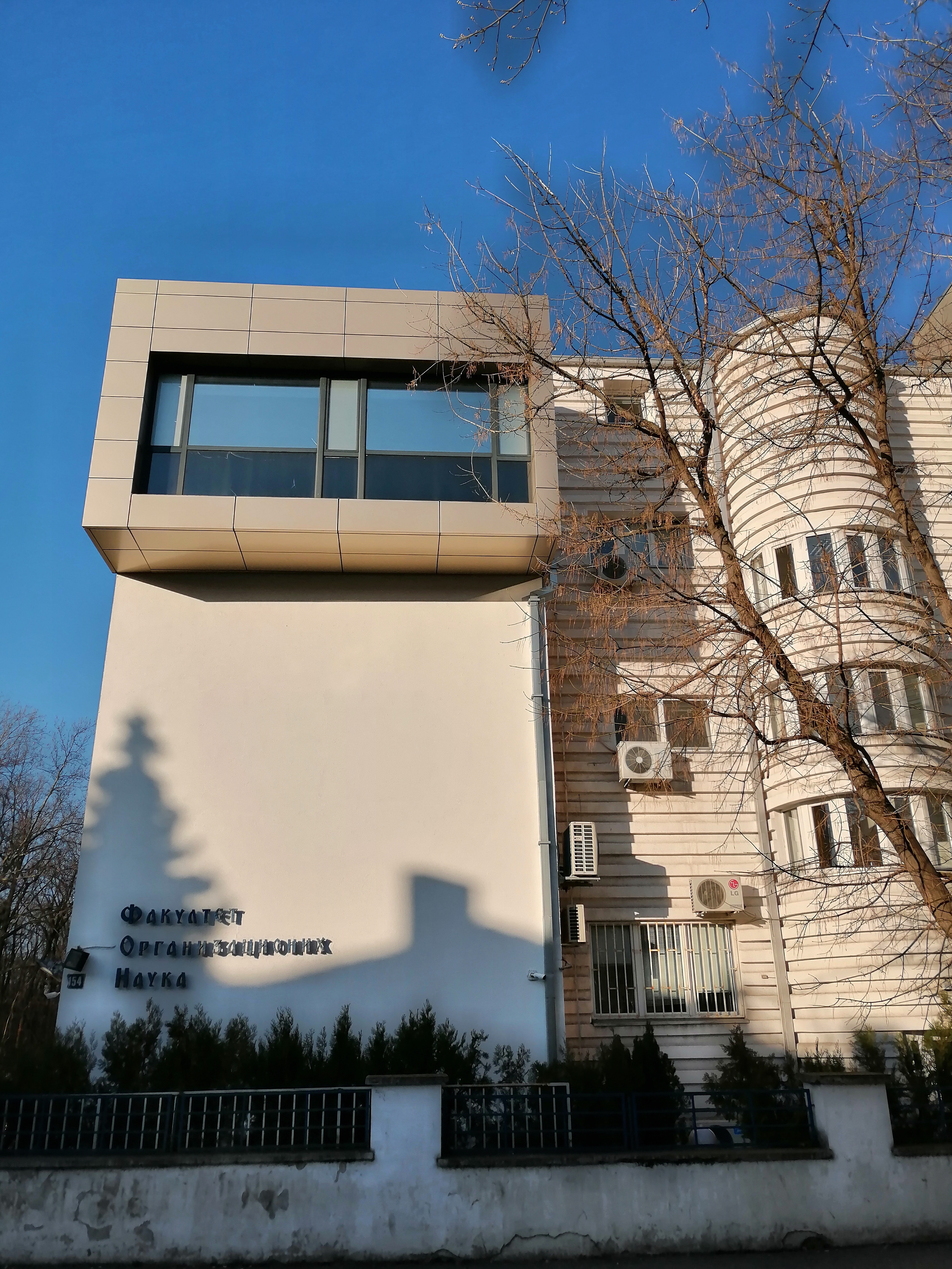 Fakultet organizacionih nauka, Beograd